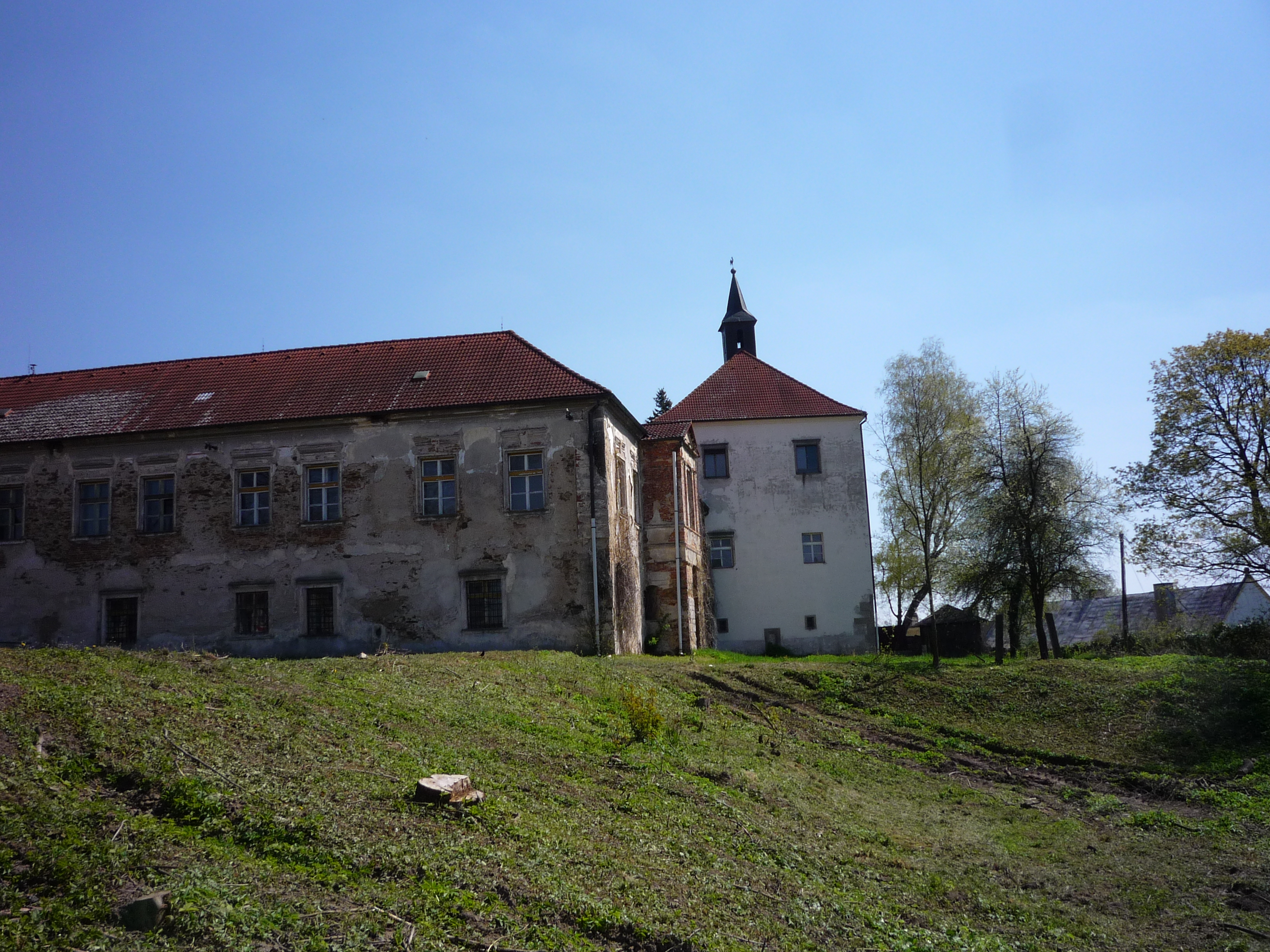 Autor fotografie Jiří Zelenka. Toulky Vysočinou. Cestou krajem básníka a malíře Jana Zrzavého. Obec Okrouhlice. Okr. Havlíčkův Brod.